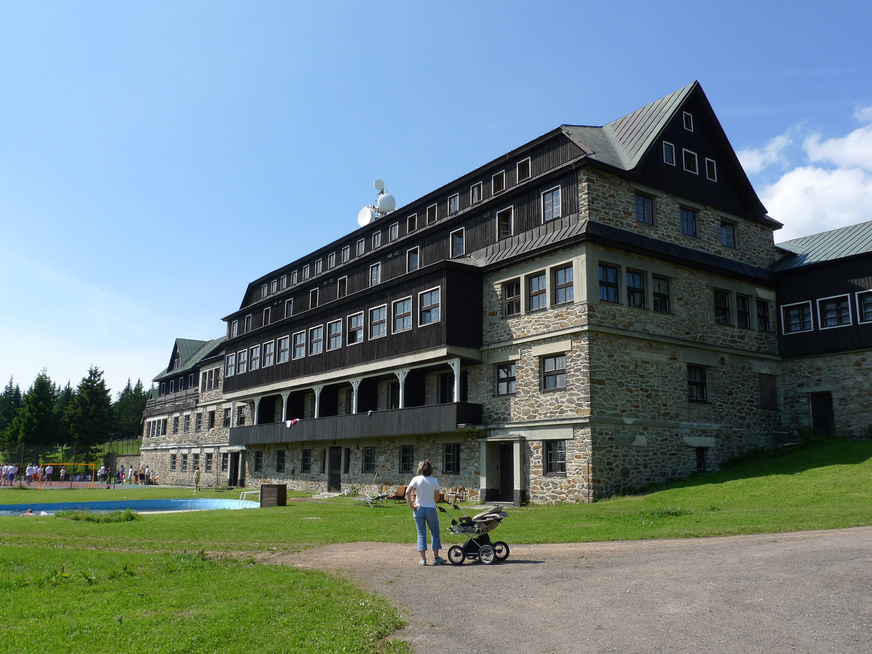 Horský hotel na Černé hoře v Krkonoších